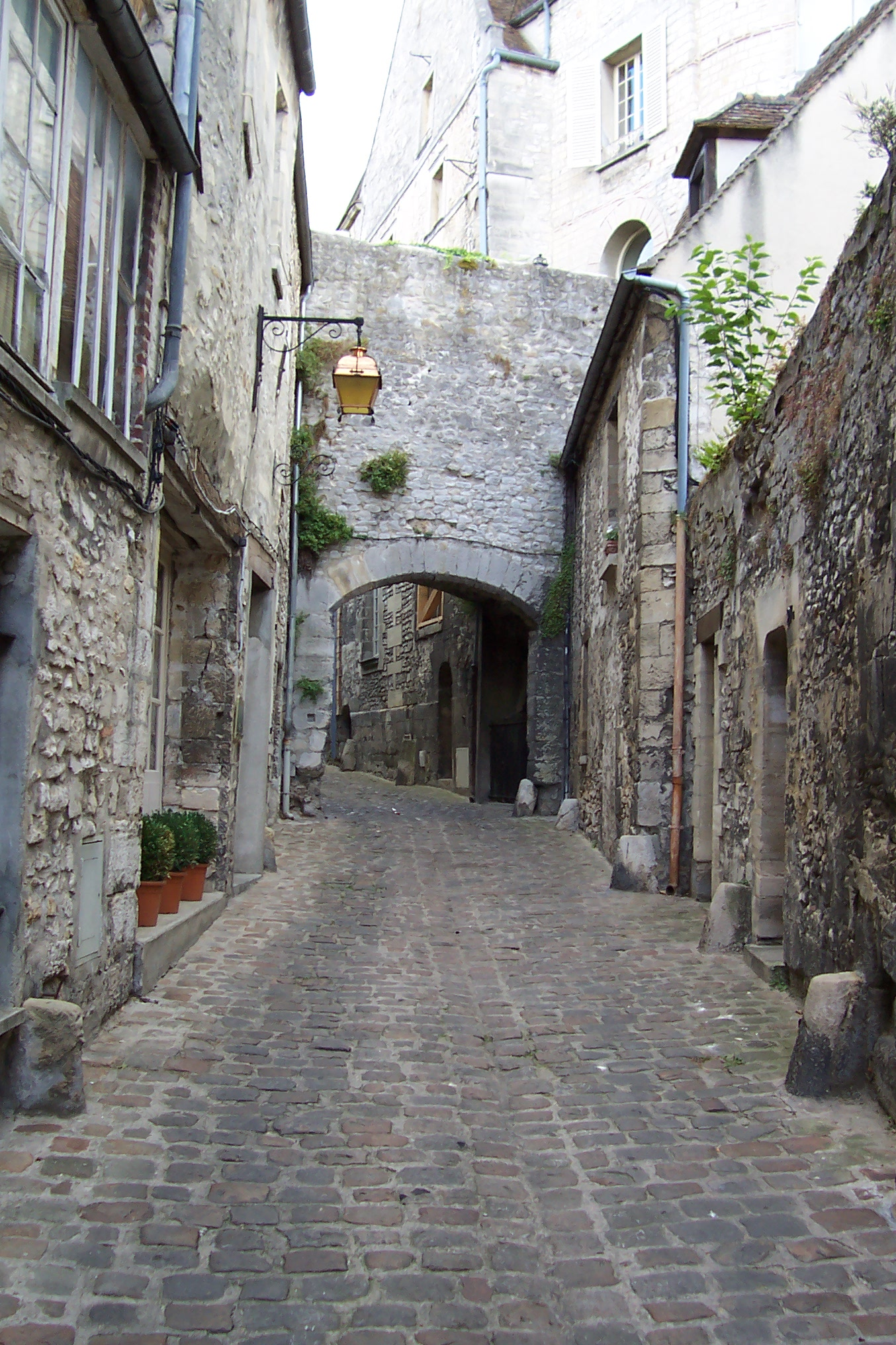 La Fausse-Porte » , poterne dans l'enceinte gallo-romaine, élargie au Moyen-Âge, rue de la Treille. Les vestiges de la voussure d'origine restent visibles dans l'intrados, en sortant de la ville à gauche.